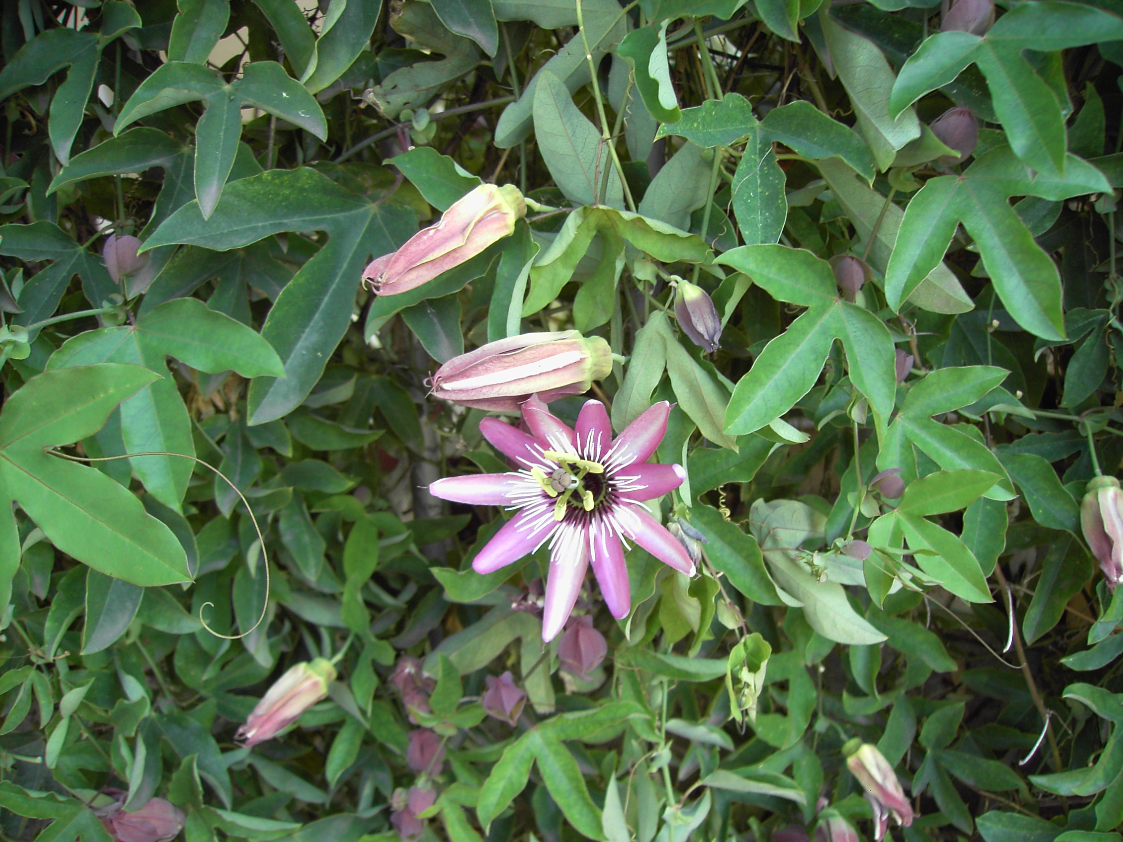 Roma, settembre. Passiflora *This is Passiflora × violacea, a hybrid of Passiflora coerulea and Passiflora racemosa194.134.193.16 22:02, 13 March 2006 (UTC)